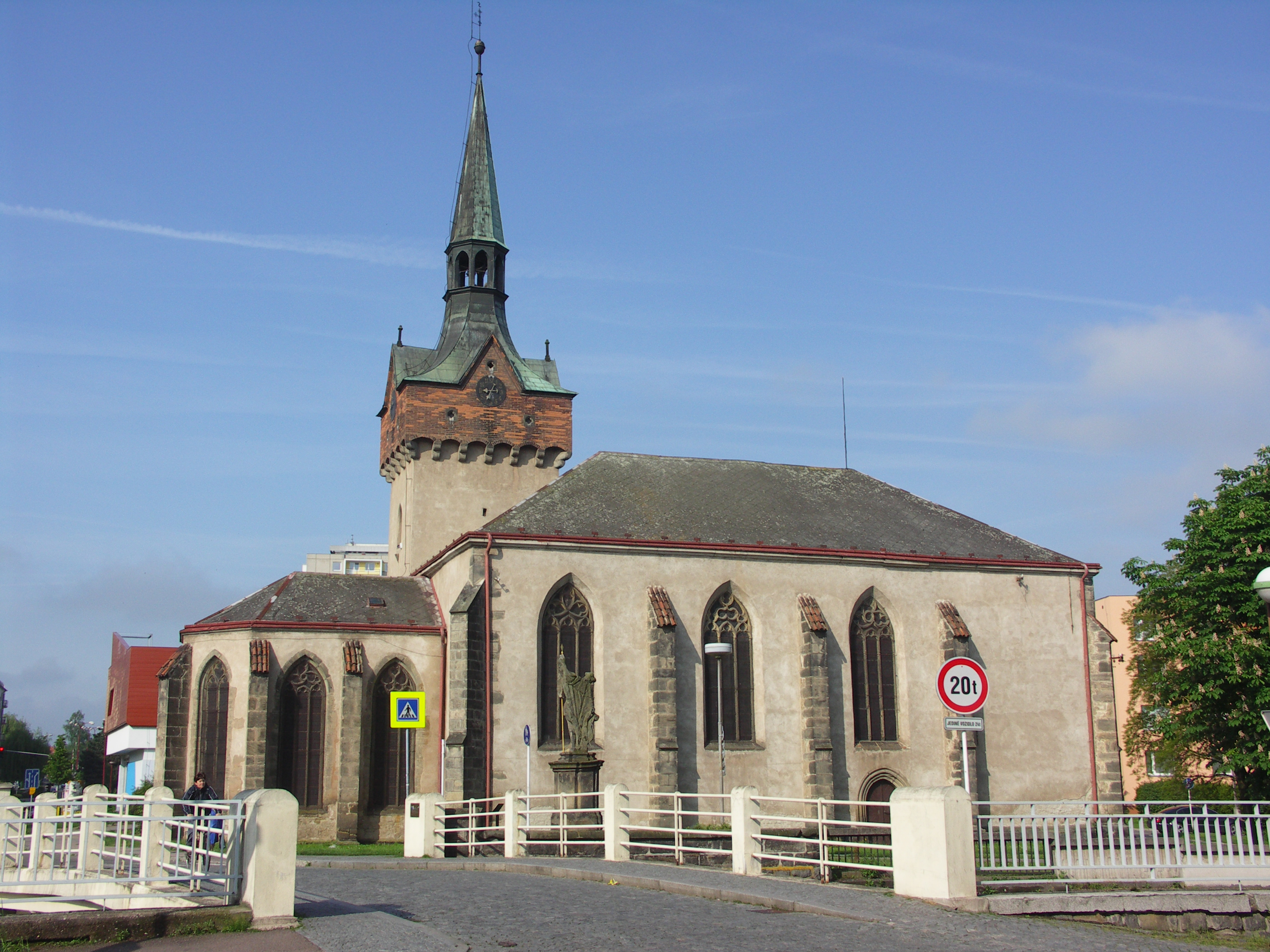 kostel sv. Kateřiny Alexandrijské (Chrudim), Husova ul., Chrudim